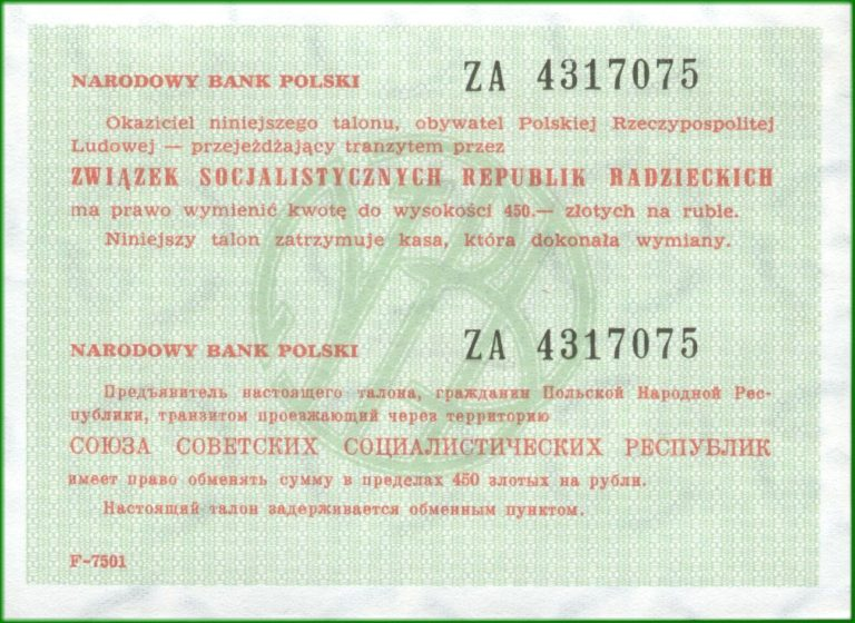 Talon Tranzytowy NBP serii Z (przeznaczony na ZSRR) uprawniający do wymiany 450 złotych przy przejeździe tranzytem przez ZSRR.